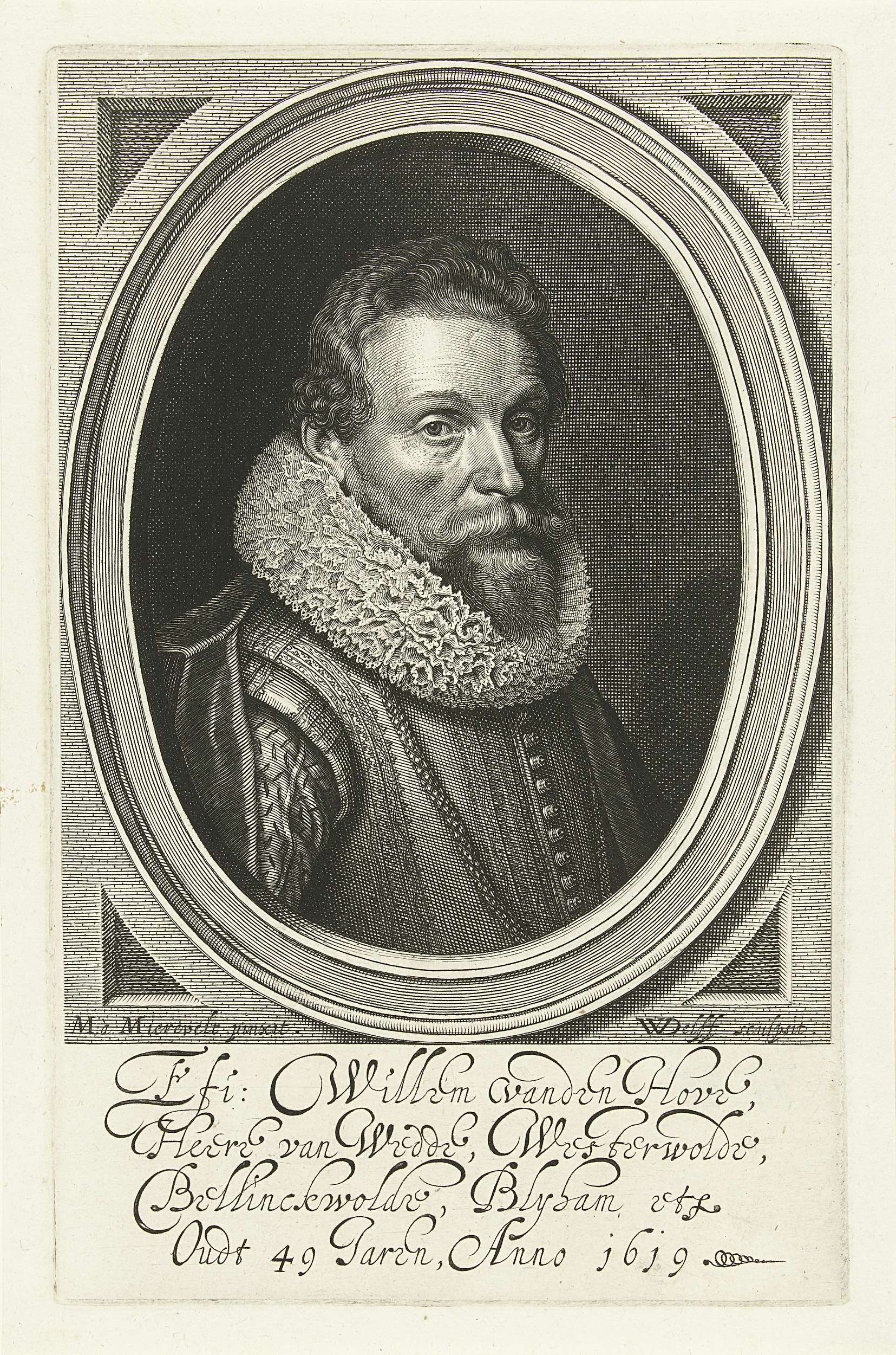 Portret van Willem van den Hove op 49-jarige leeftijd, Willem Jacobsz. Delff, naar Michiel Jansz. van Mierevelt, 1619 gravure, h 215mm × b 136mm